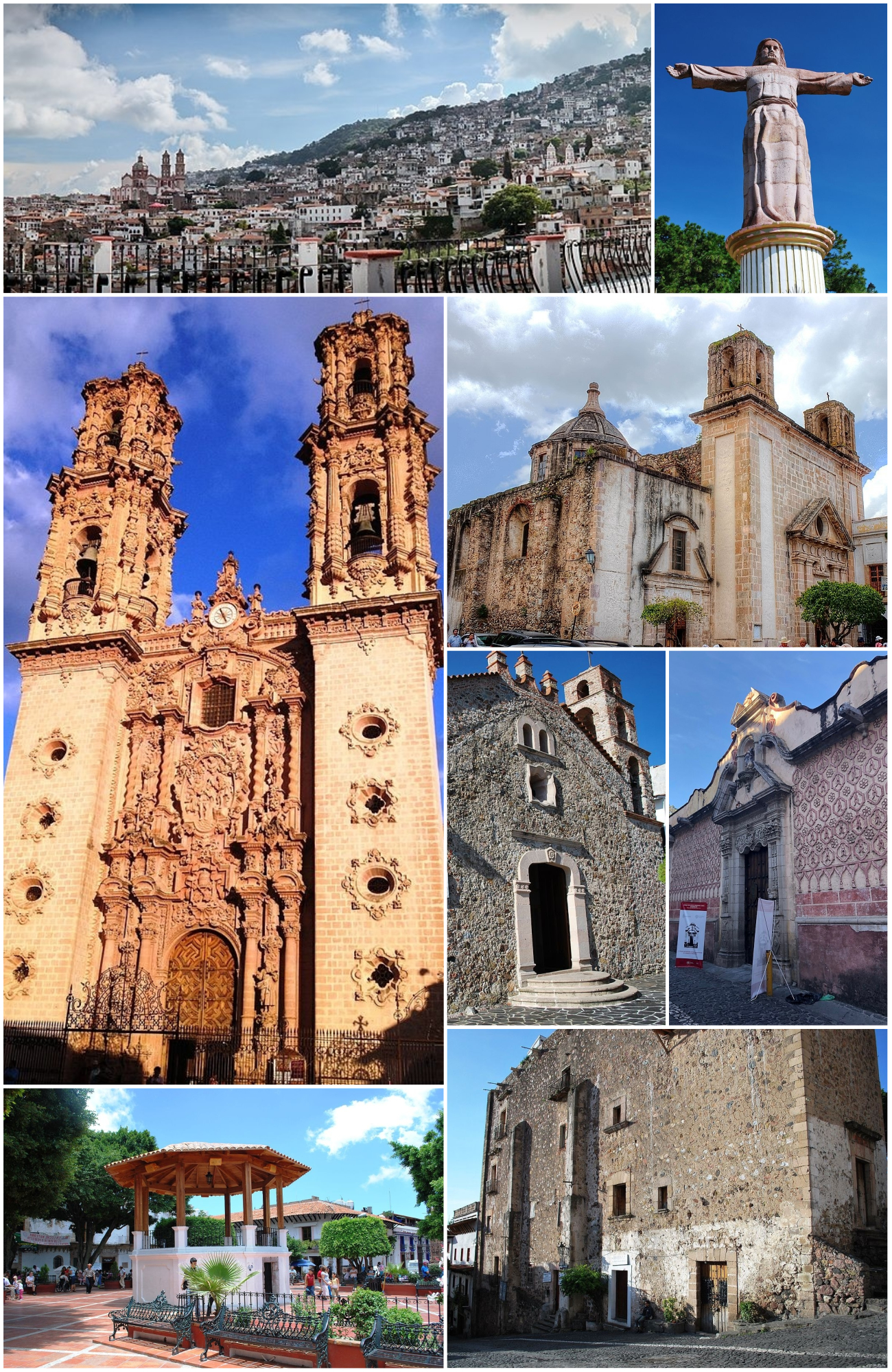 Taxco de Alarcón